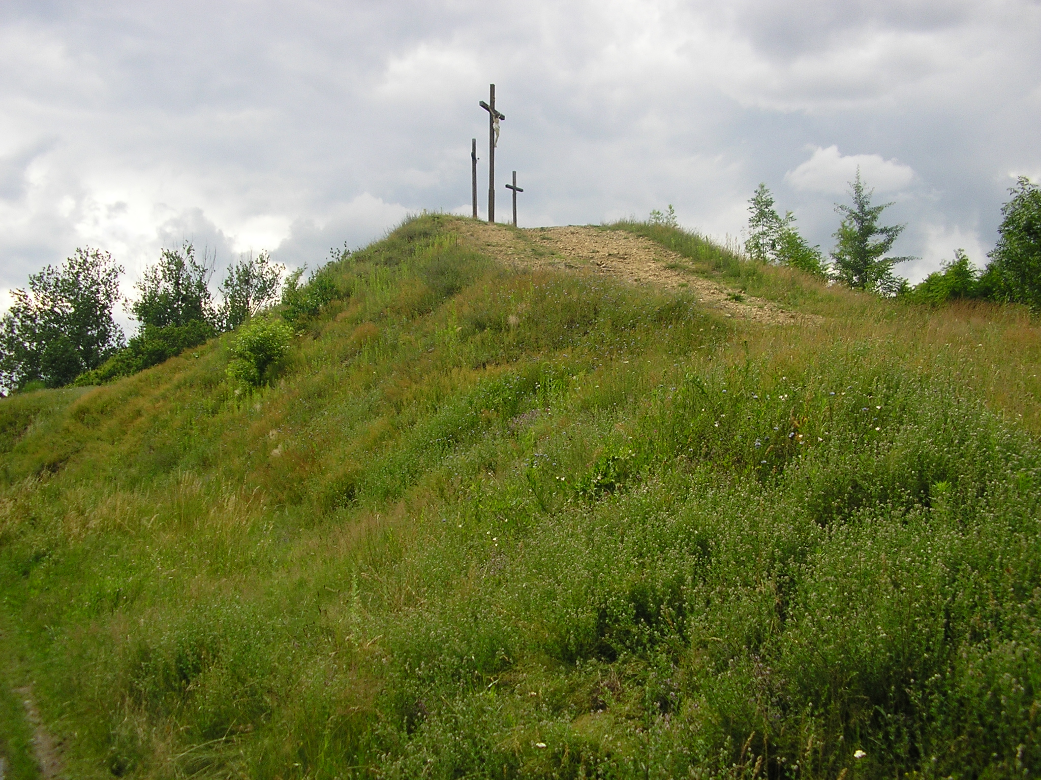 Góra Trzech Krzyży